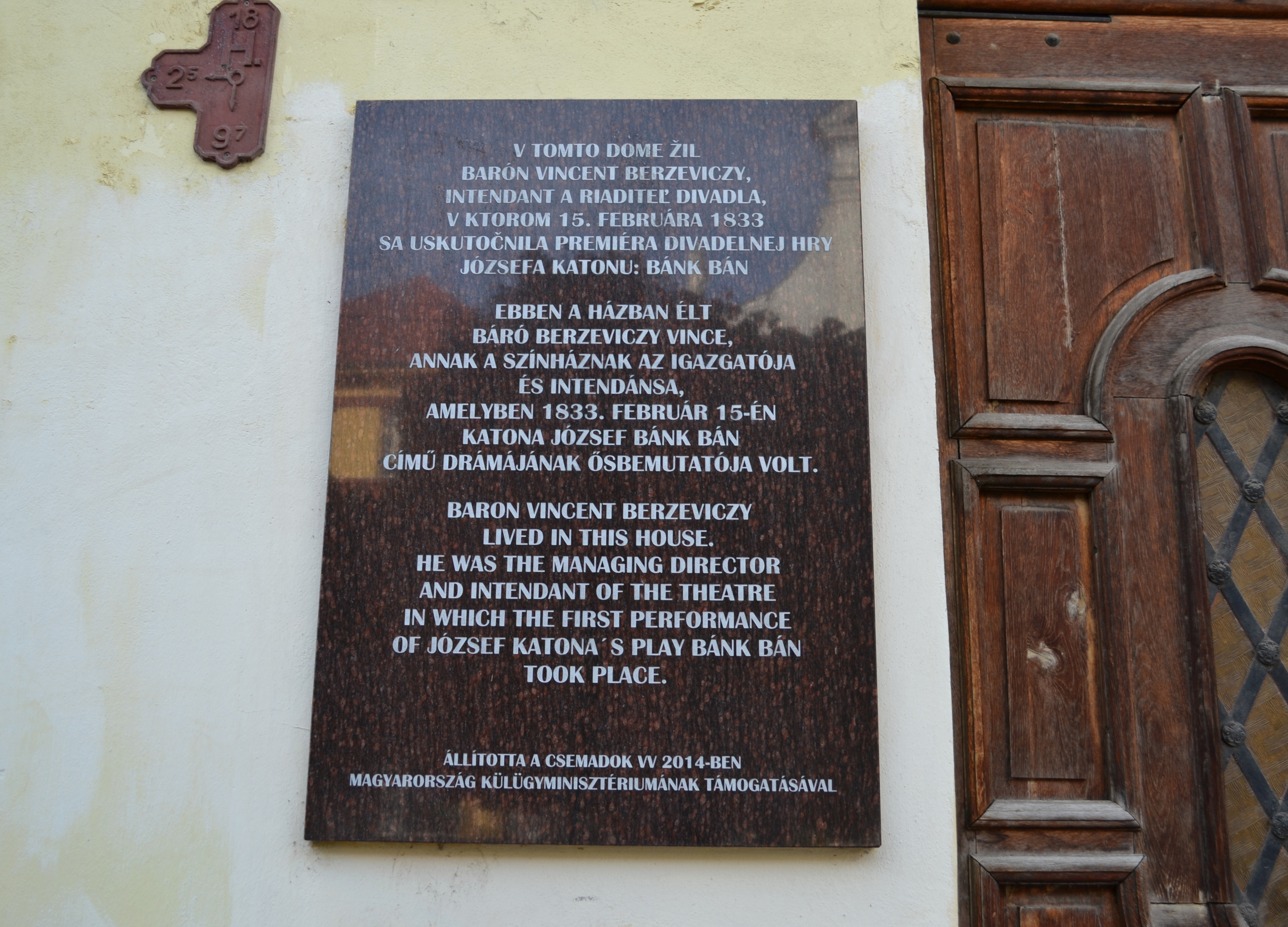 Košice, Hlavná ulica 84, pamätná tabuľa na dome, v ktorom žil barón Vincent Berzeviczy, mecén košického divadelného života